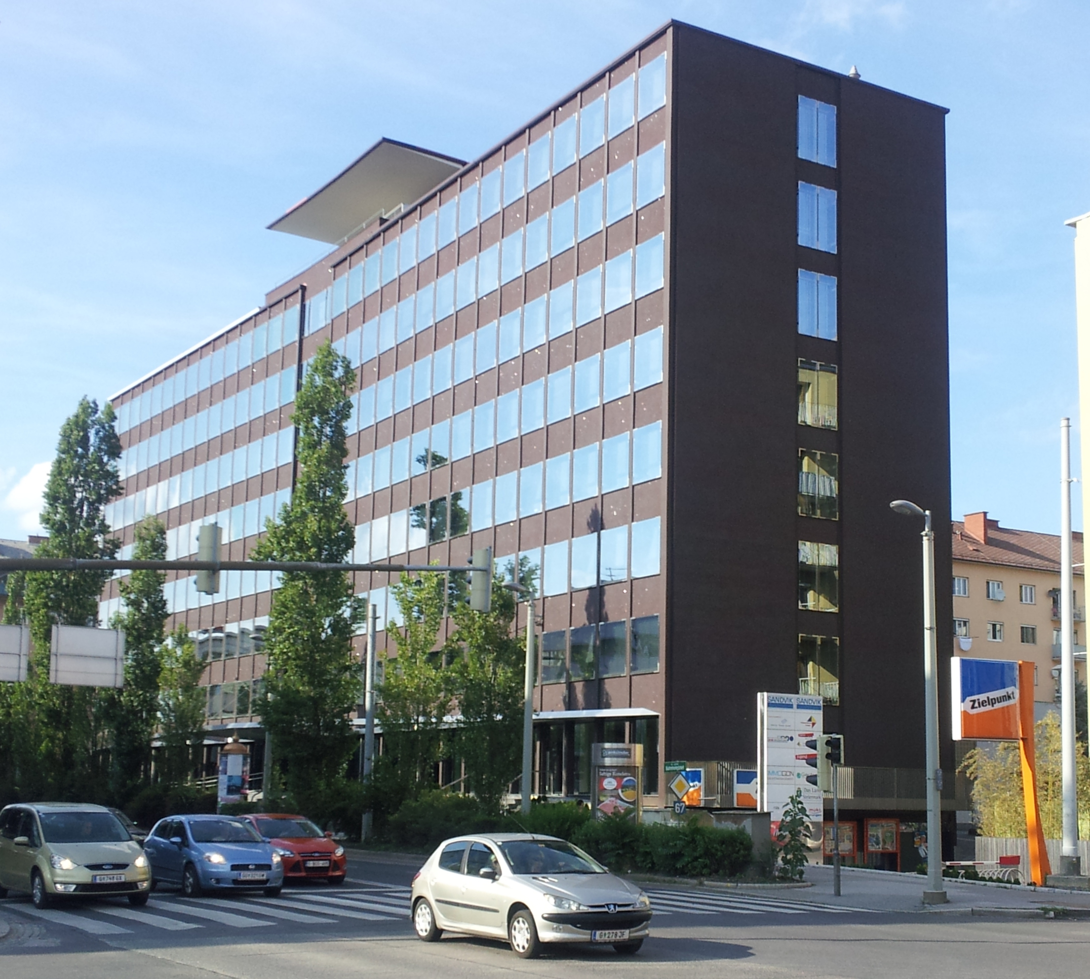 Ehemaliges Verwaltungsgebäude der Pensionsversicherungsanstalt, denkmalgeschütztes Objekt Standort: Graz, Katastralgemeinde: Lend, Adresse: Bahnhofgürtel 77-79